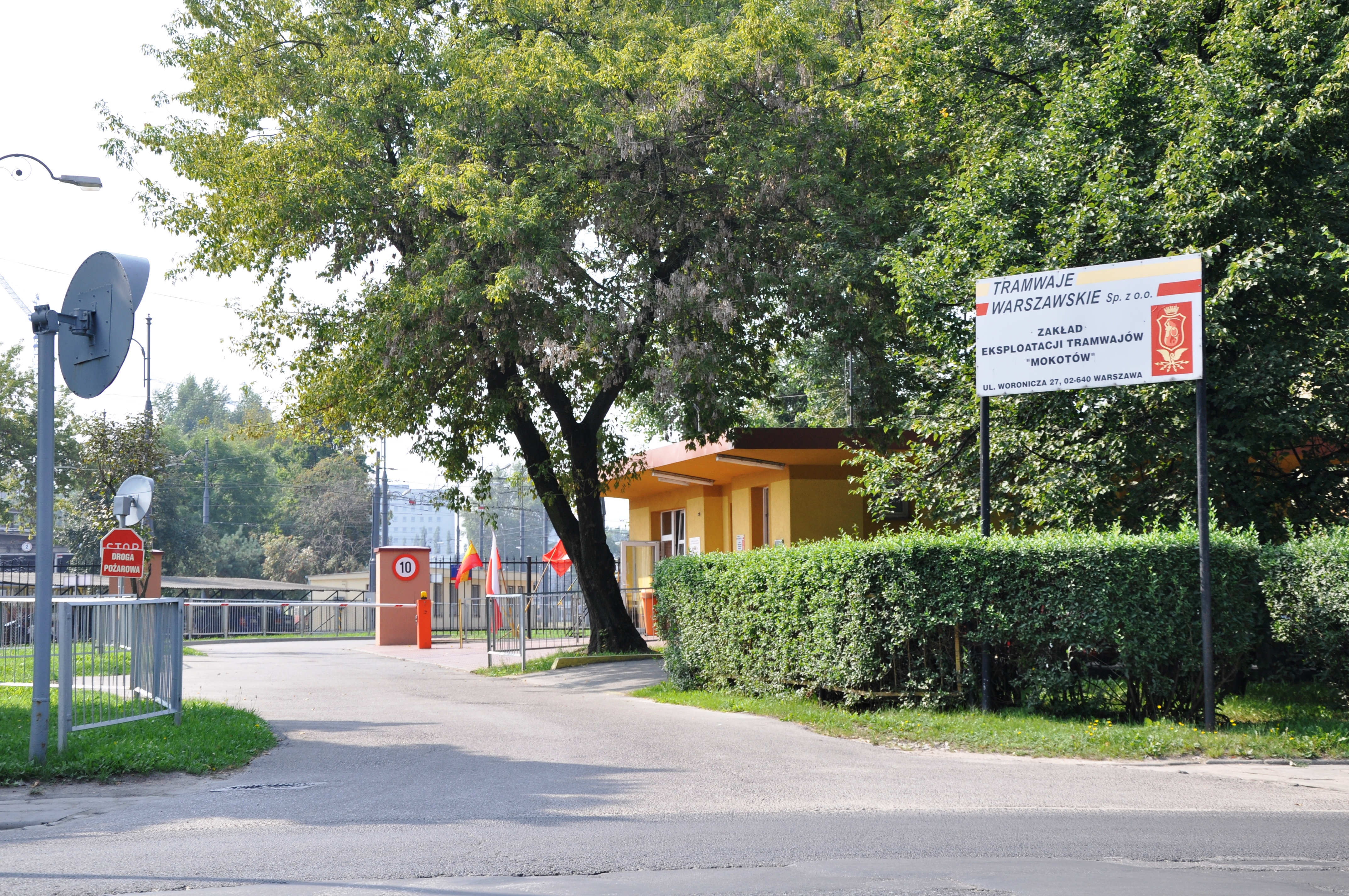 Warschau, Jana Pawla Woronicza.